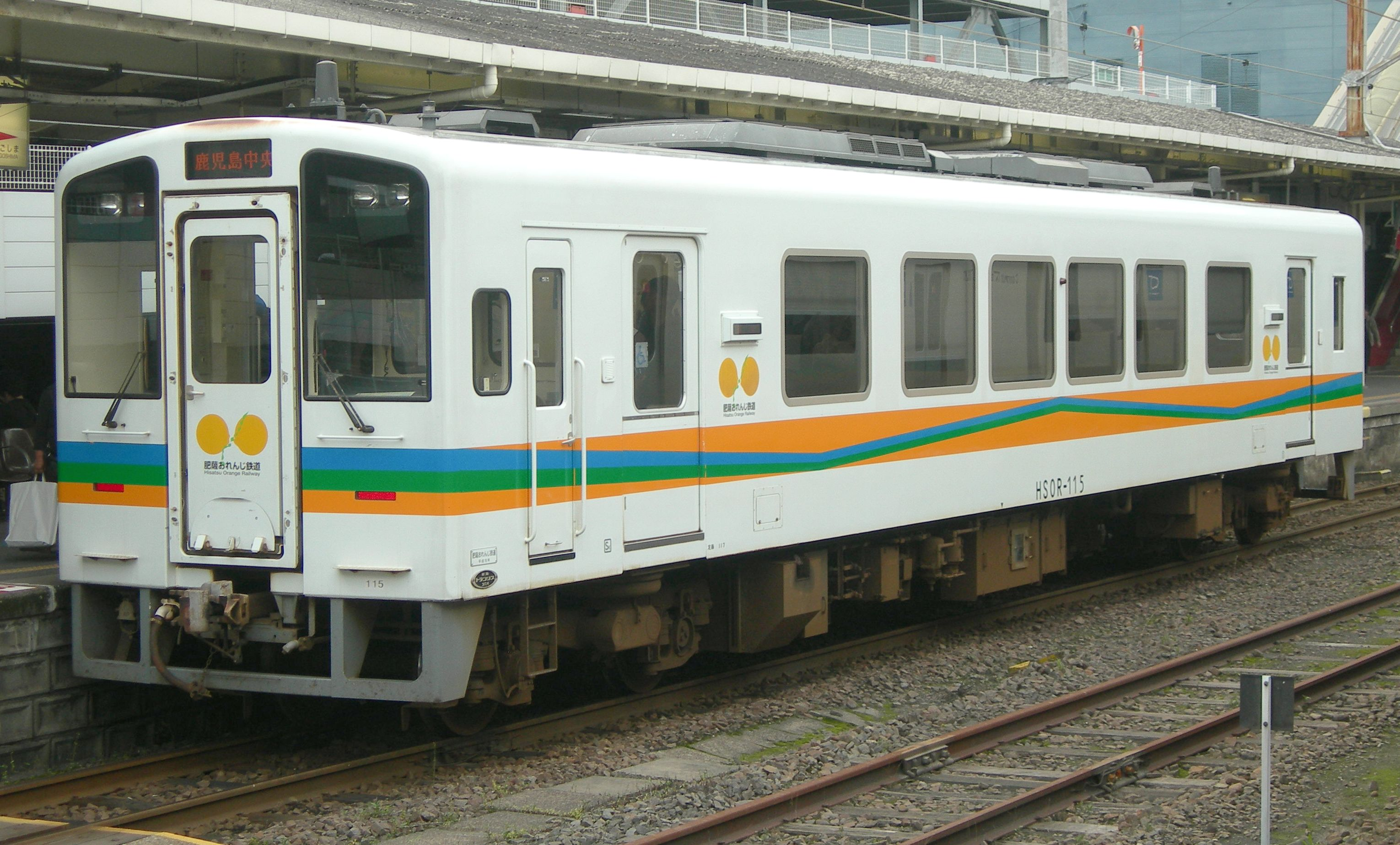 肥薩おれんじ鉄道HSOR-100形気動車 鹿児島中央駅で撮影